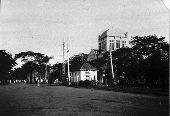 Foto. Het gebouw van de Bouwploeg aan de Van Heutz Boulevard, wijk Gondandia, Batavia.